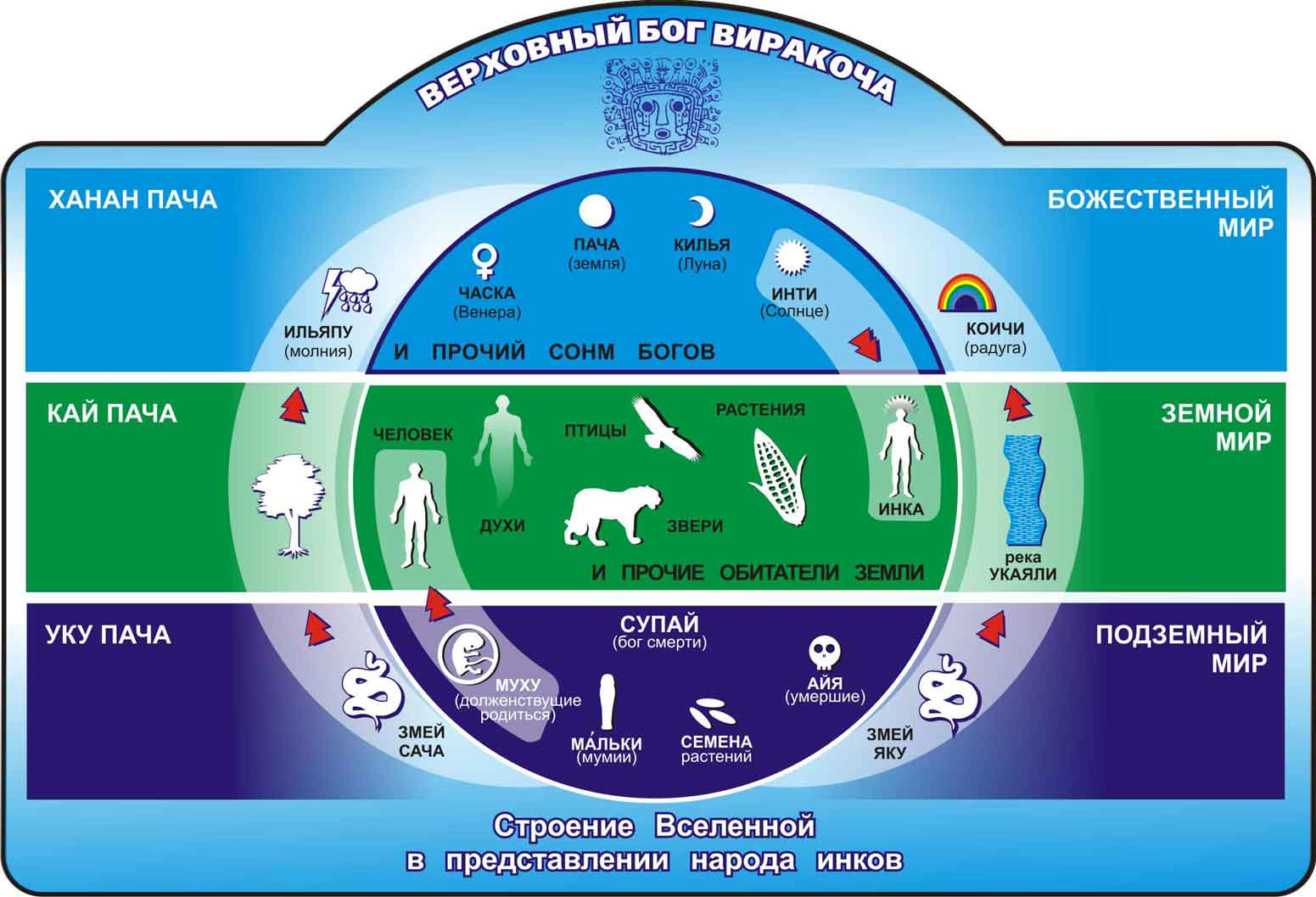 Устройство Вселенной в представлении народа инков